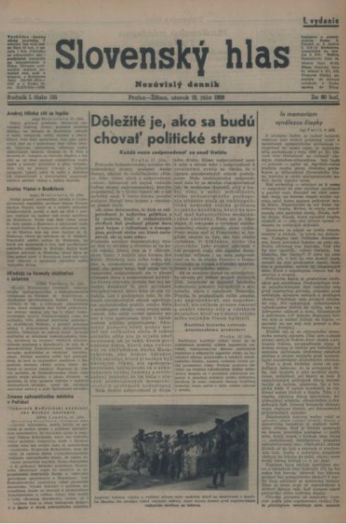 Titulný list denníka Slovenský hlas, ktoré vychádzalo na Slovensku v období 2. sv. vojny.